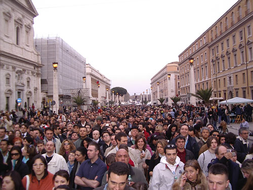 Via della Conciliazione during the Funeral of Pope John Paul II